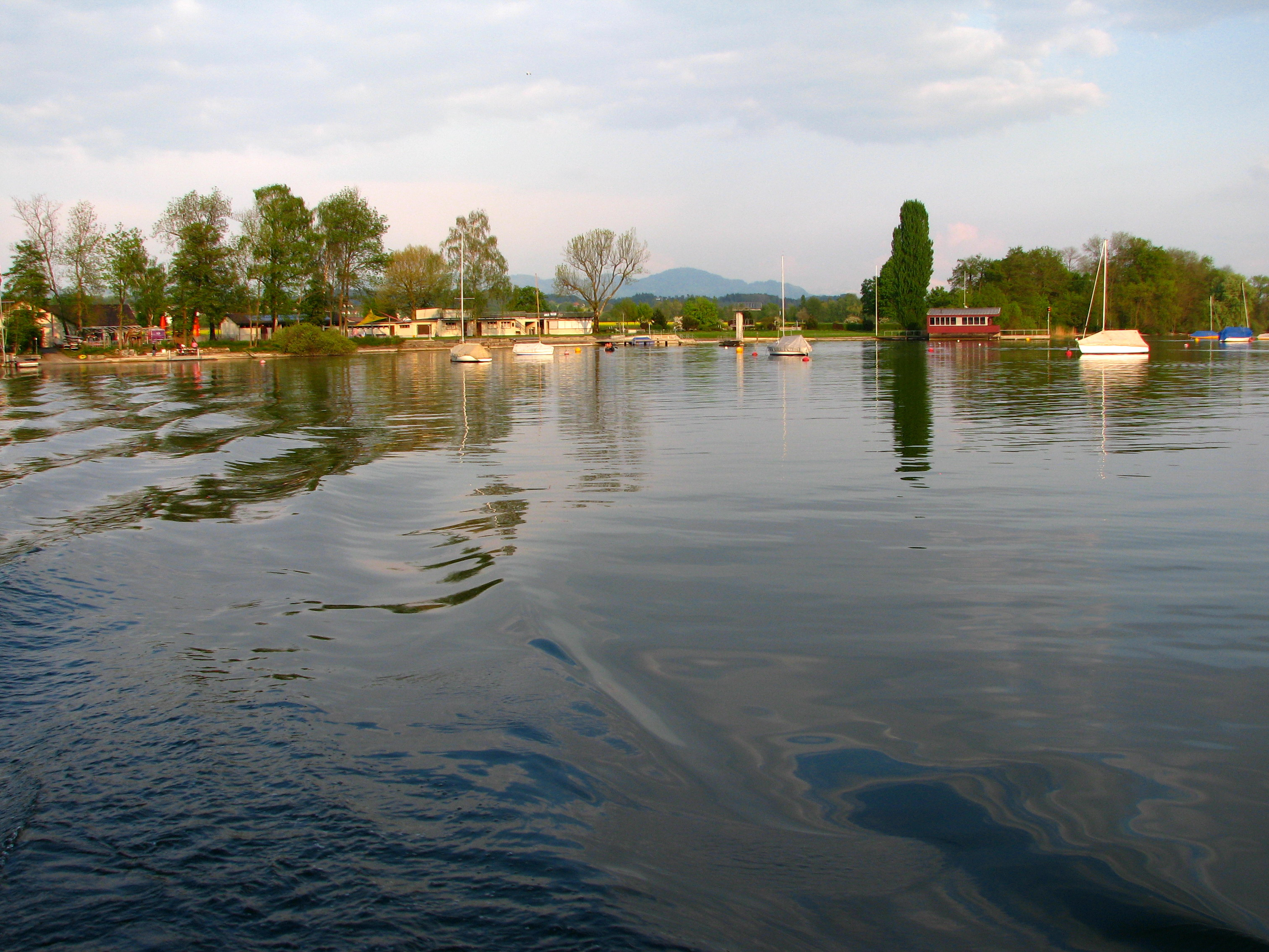 Greifensee, Niederuster lido in the background